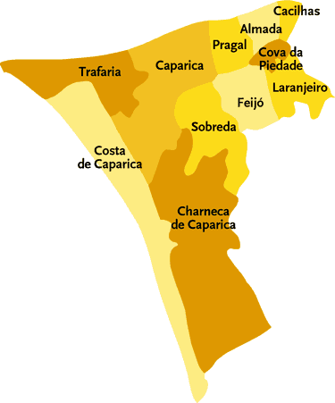 Mapa da Cidade de Almada